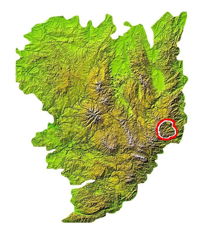 Situation du massif des Boutières sur la carte du Massif central